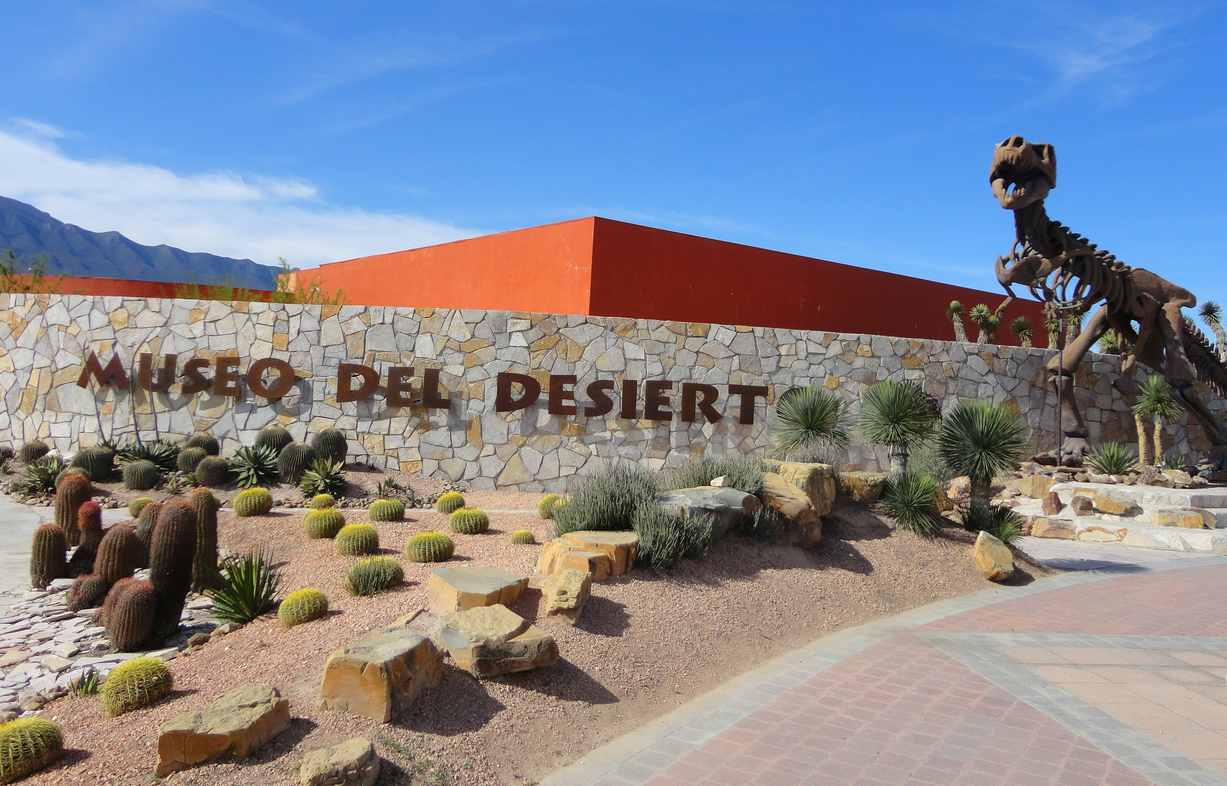 Museo del Desierto, Saltillo, Coahuila, México. Museo de historia natural con una colecciones de fósiles, plantas y animales nativos del desierto mexicano.